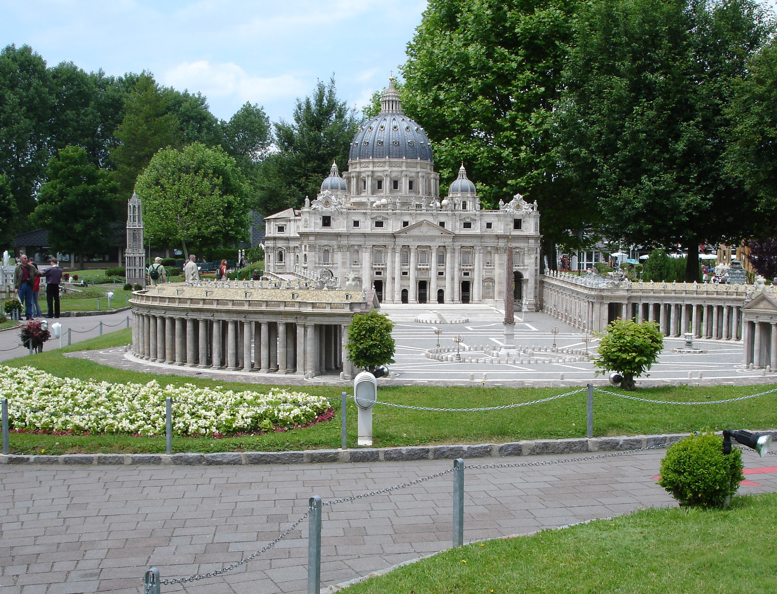 Model of St. Peter's basilica, Minimundus (Klagenfurt